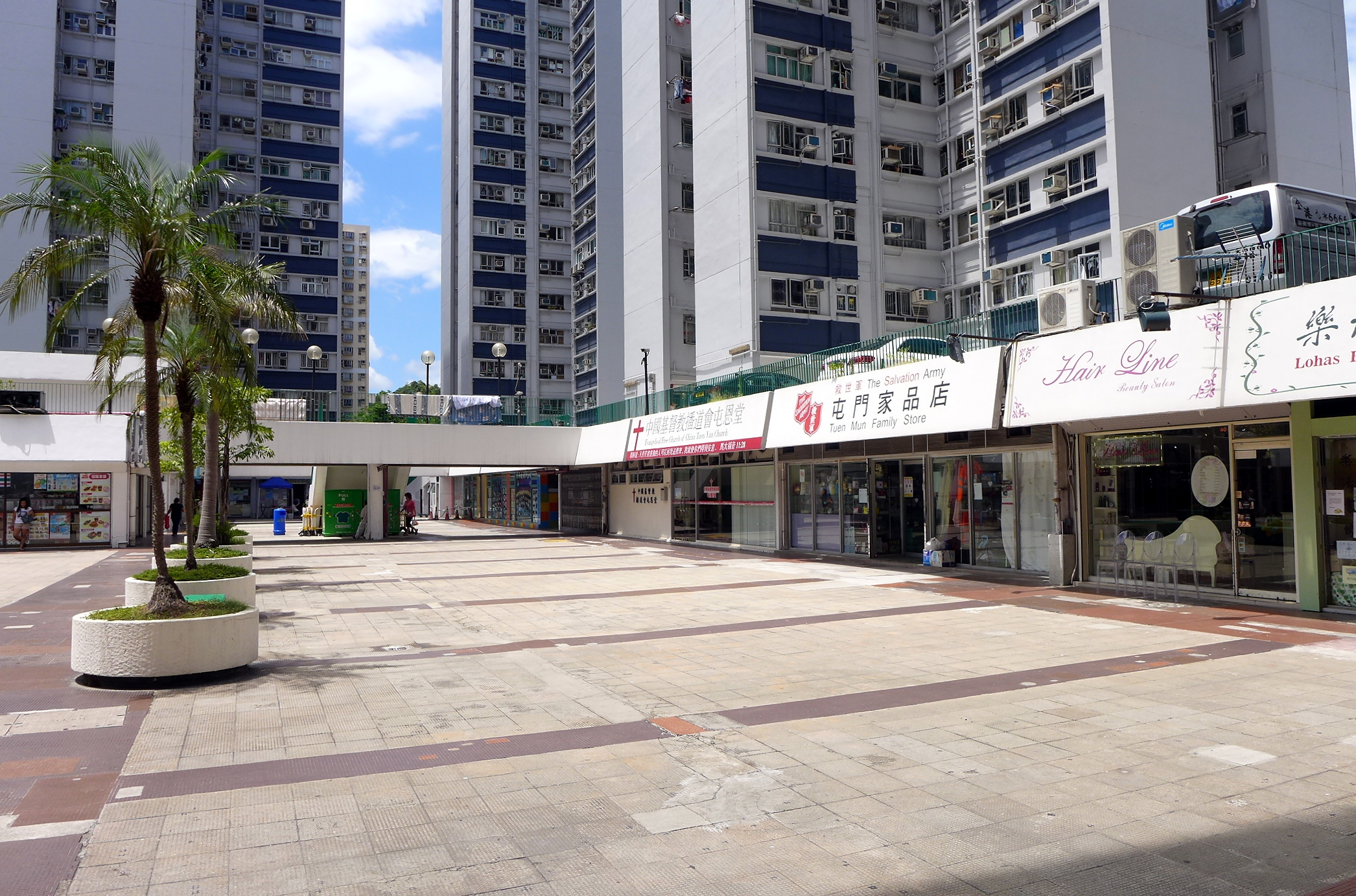 Chi Lok Garden Shops